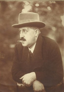 Dr. Just Sándor egyik utolsó képe.